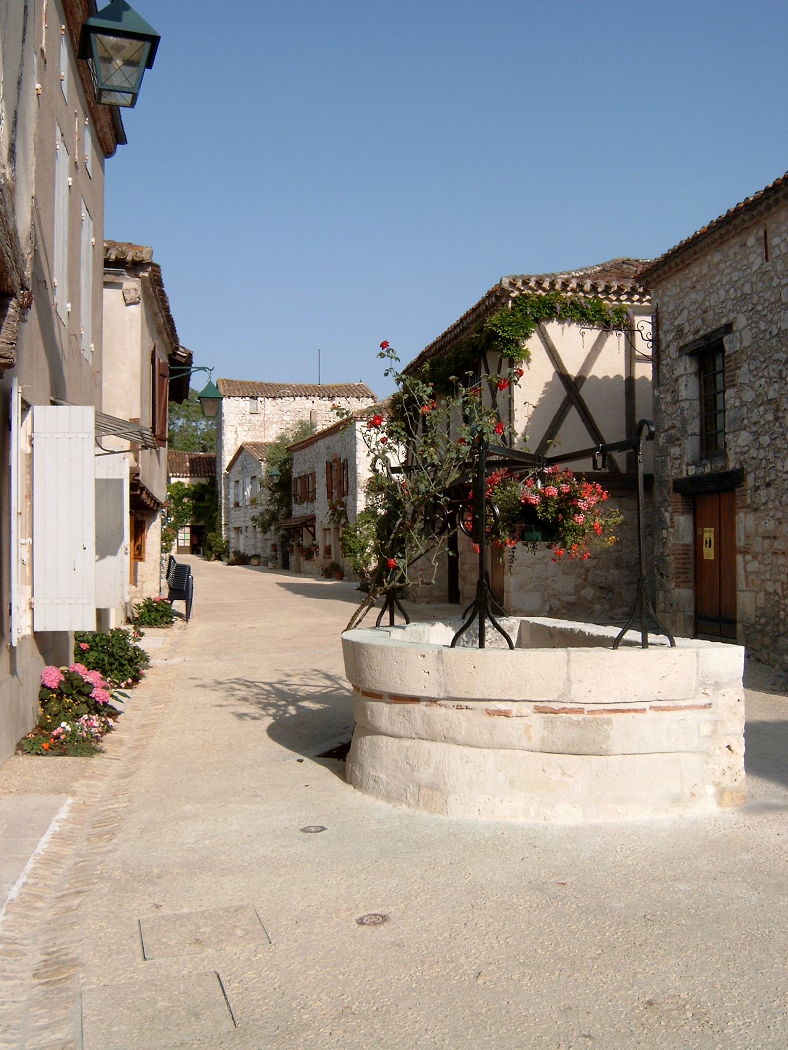 Pujols, Lot-et-Garonne, France. Photo perso prise en 2003 lors d'une visite à mon cousin Gérard